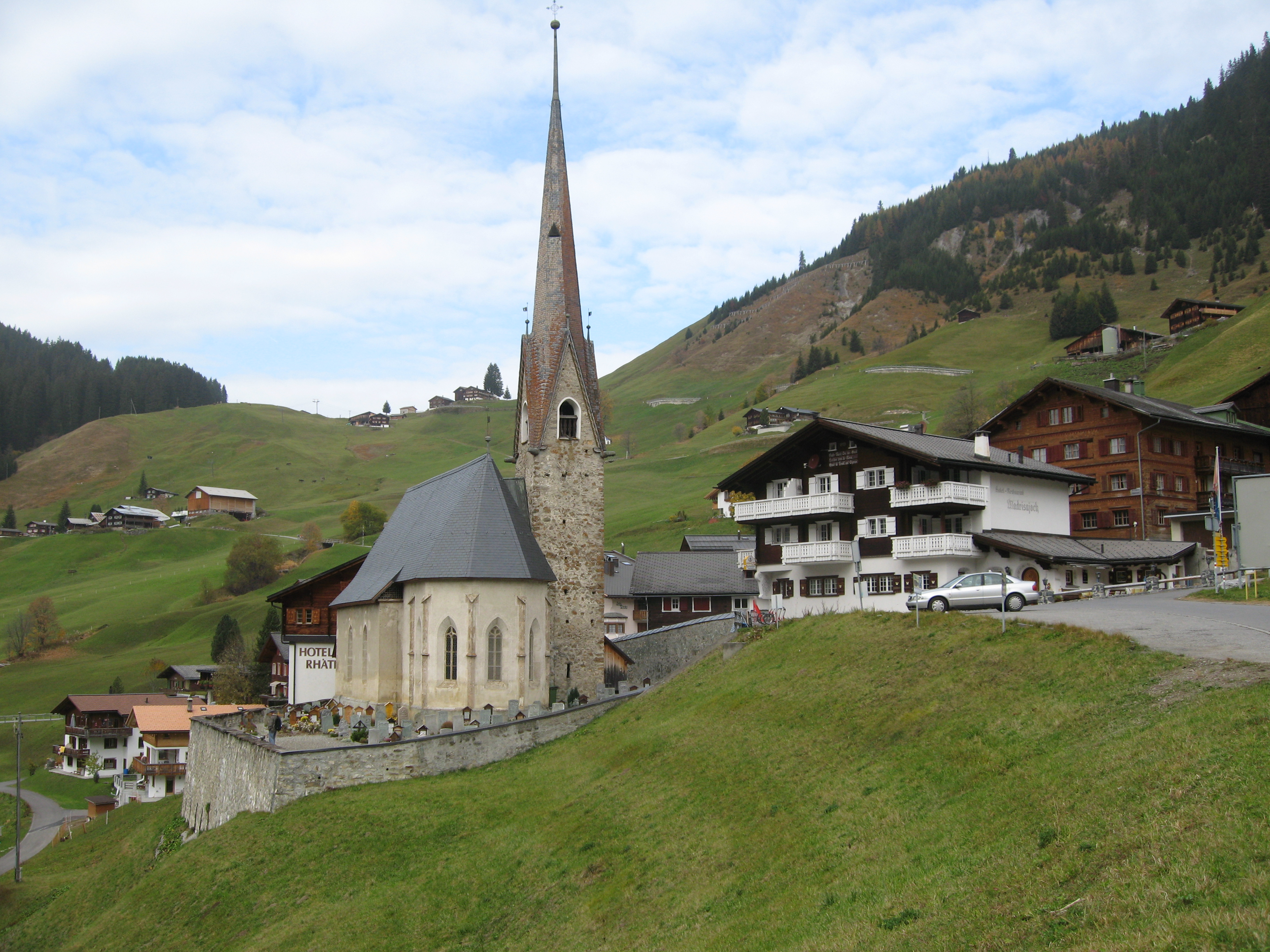 St._Antönien Platz, aufgenommen von der Ascharinerseite Richtung Aschüel